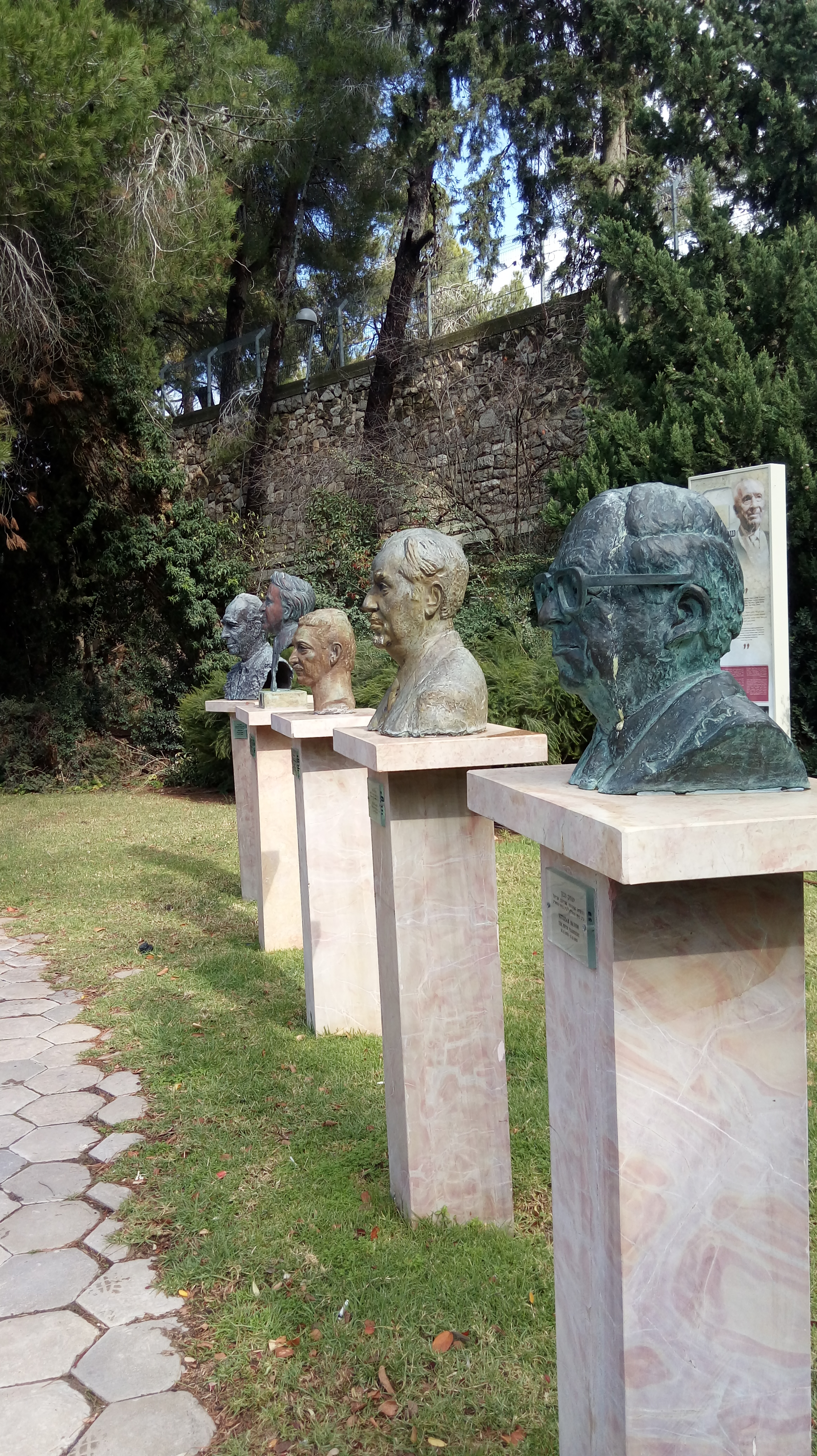 פסלי הנשיאים במשכן הנשיא